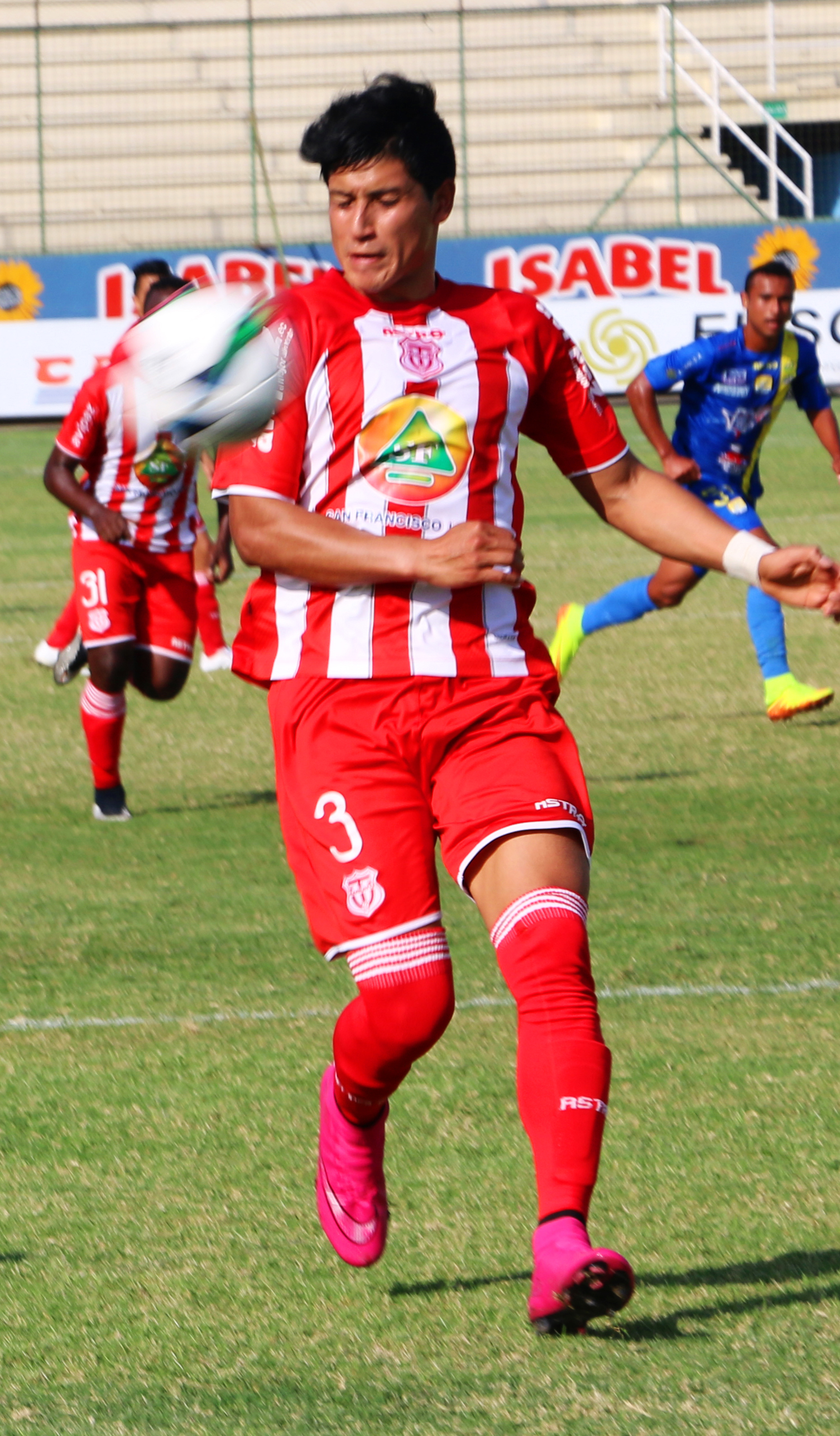 Daniel Patiño jugando en Técnico Universitario en el 2015